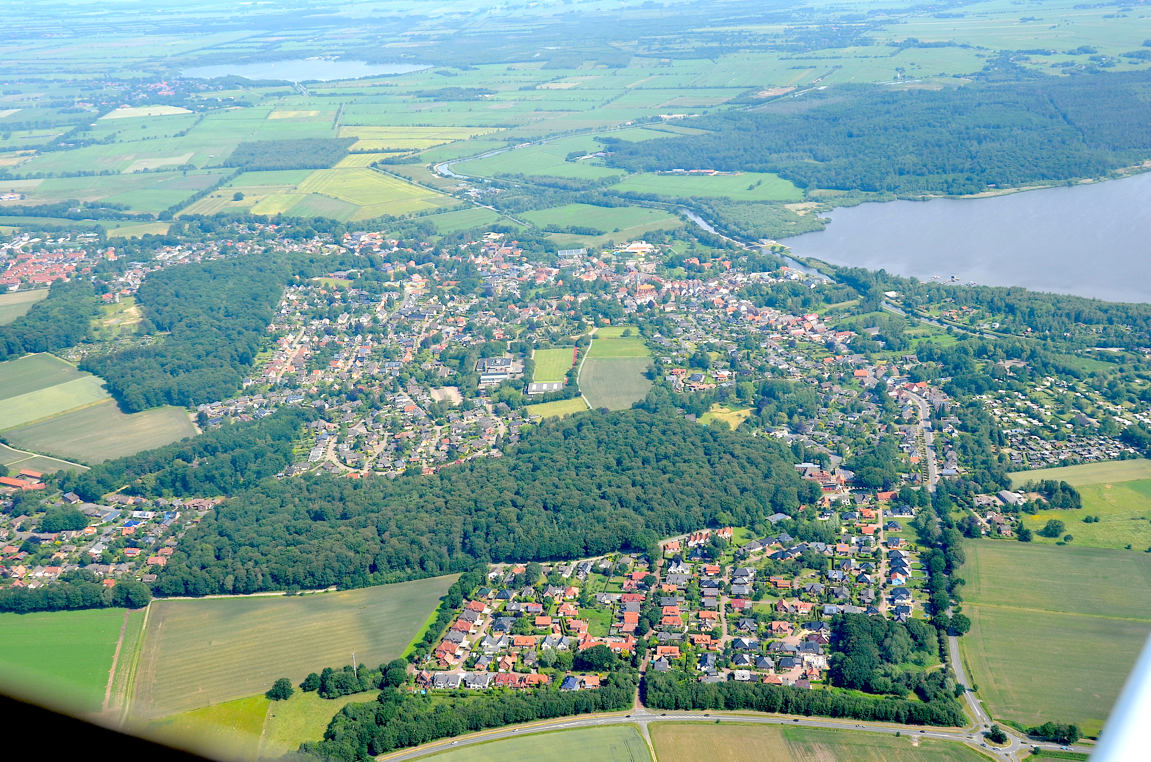 Bad Bederkesa und Naturschutzgebiet Fleckenshölzer (2019)